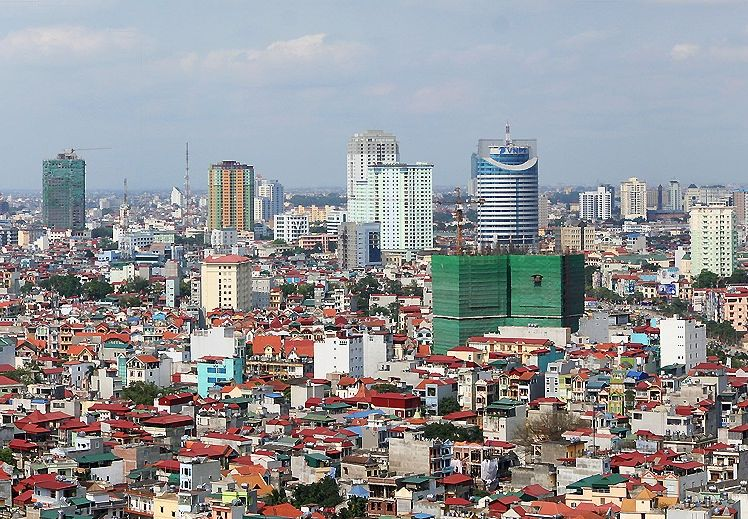 Skyline Hanoi